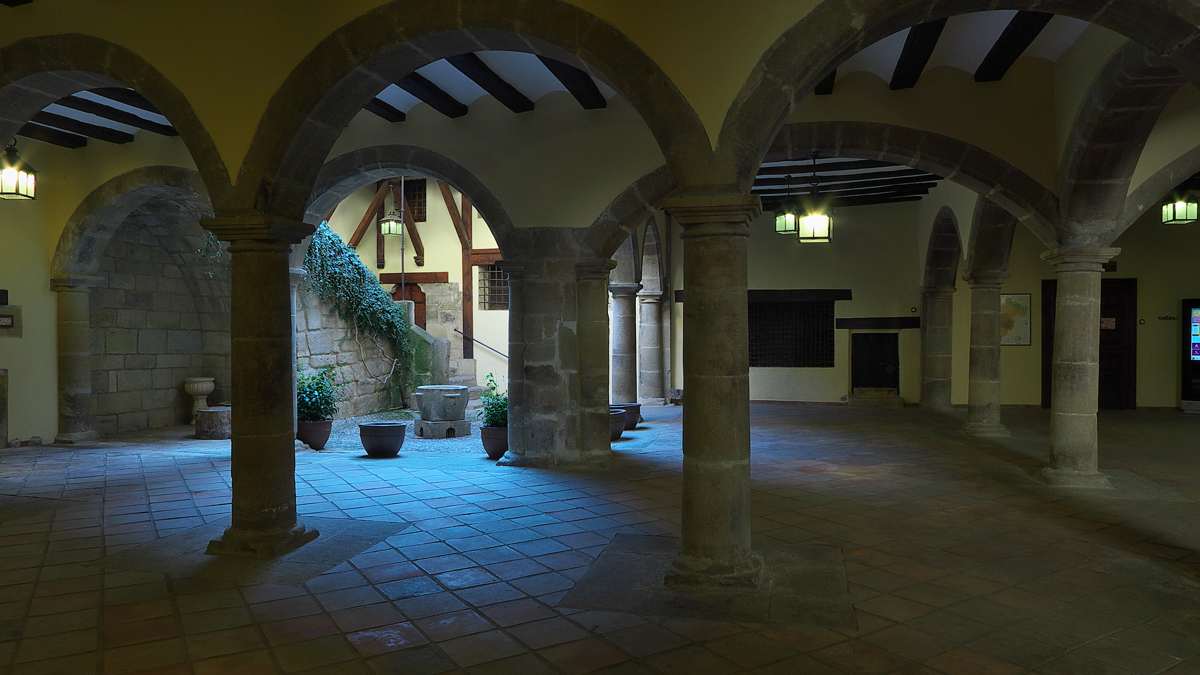 Antigua lonja de la ciudad (1571)